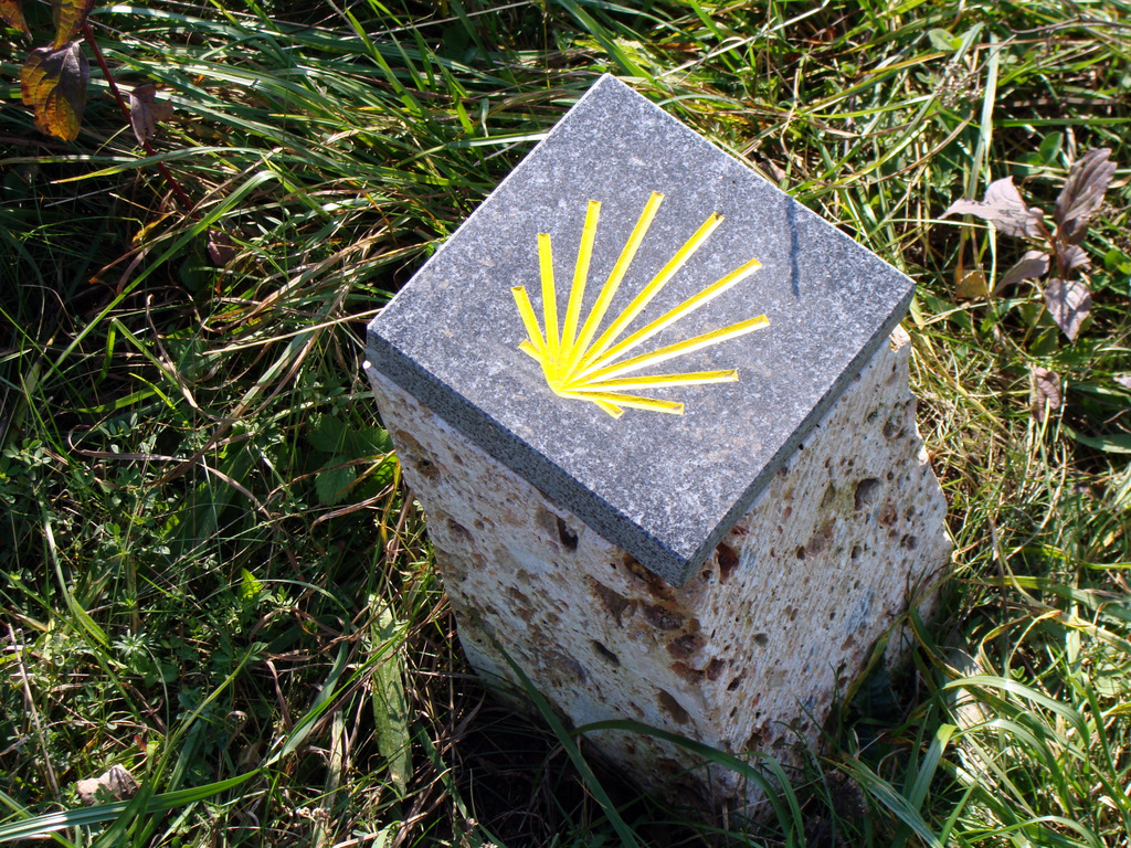 Jakobsweg Weinviertel Wegstein am Michelberg